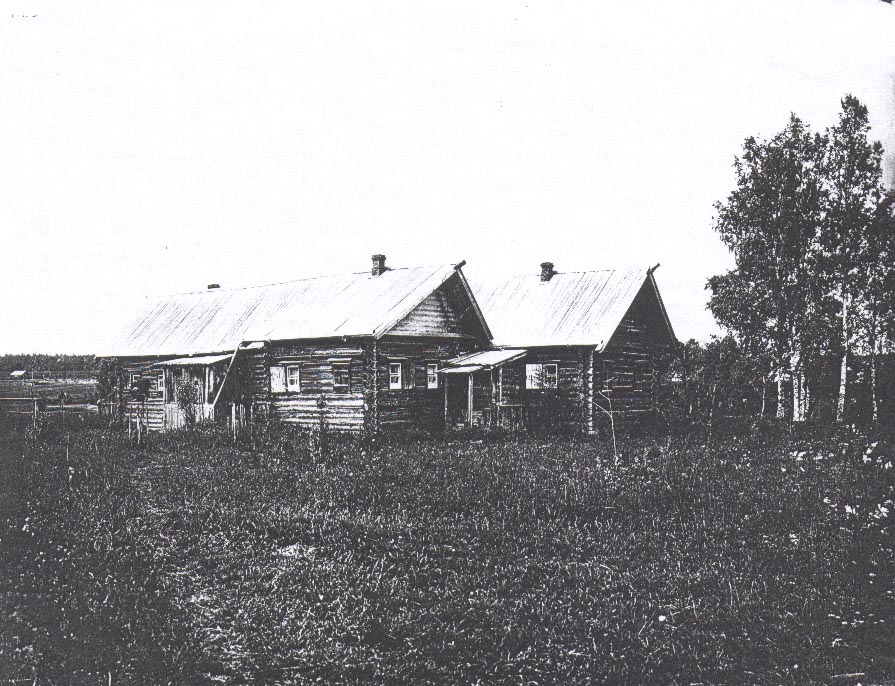 Komarov skit of Old Believers (Комаровский скит, игнатьева обитель)